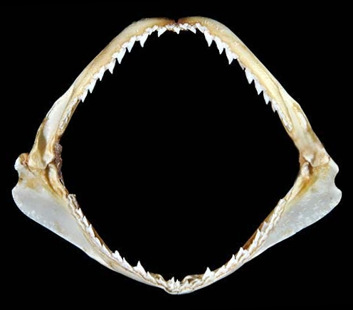 Rhizoprionodon longurio